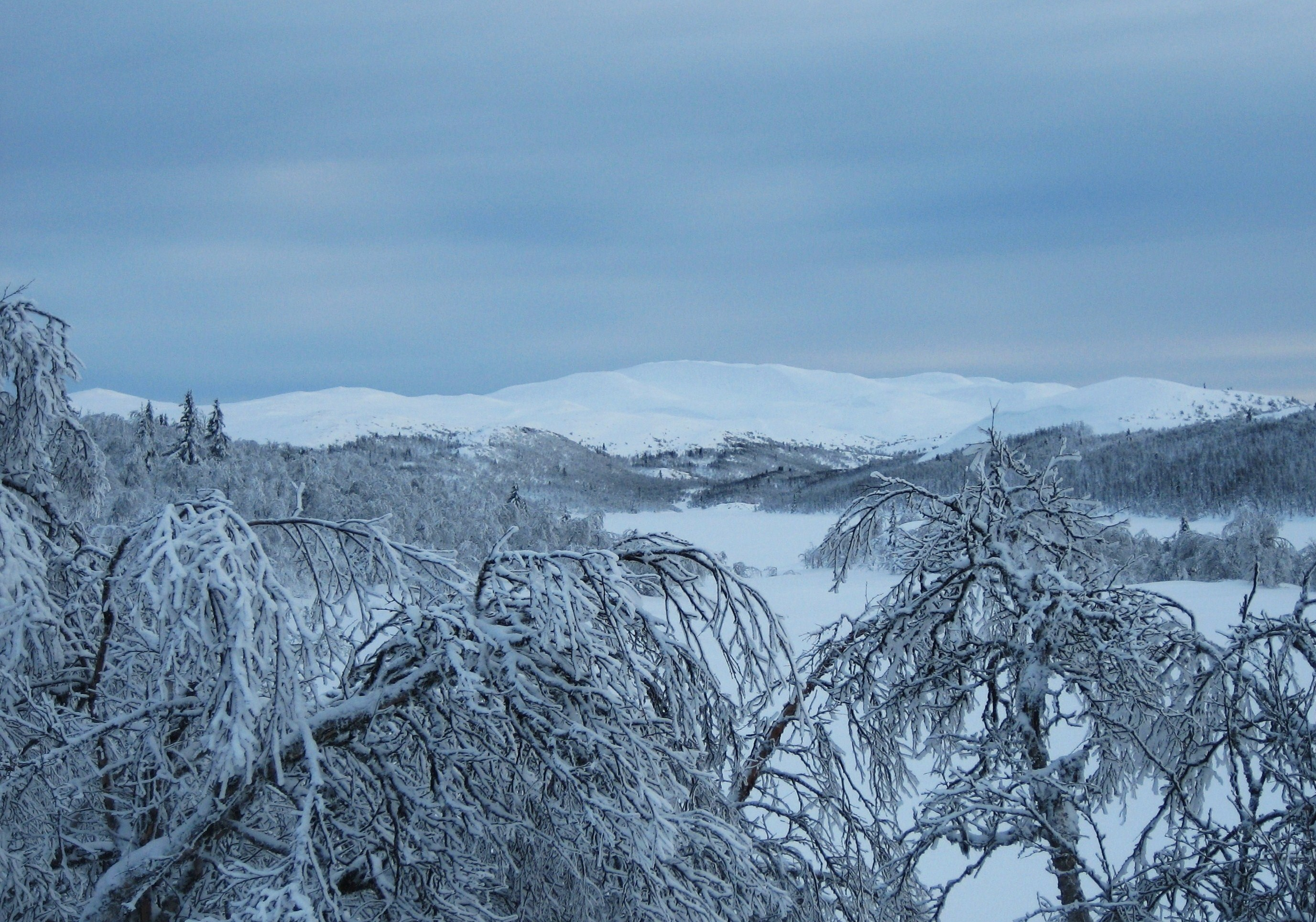 Her ser vi Synnfjellet i det fjerne.